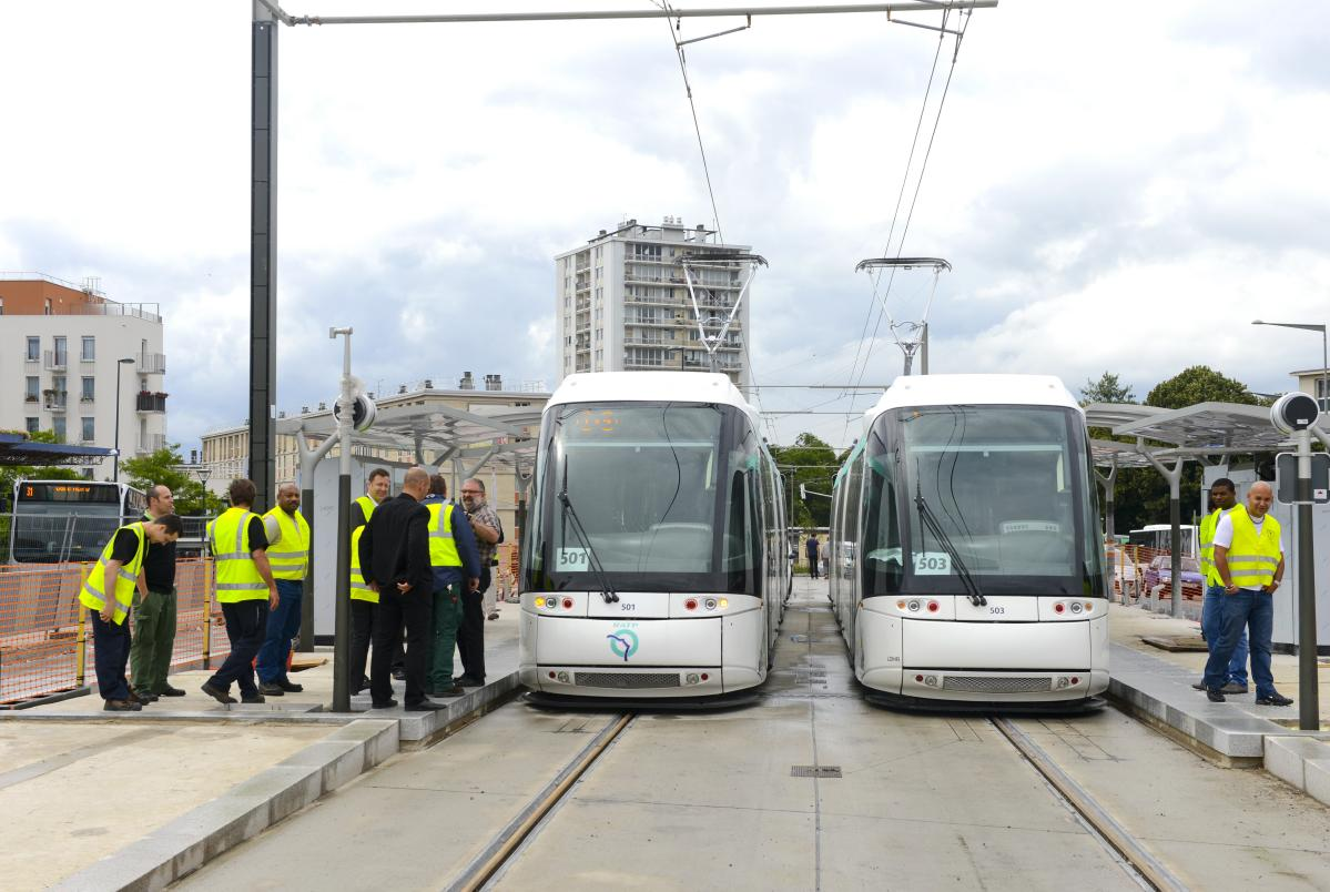 Essais du tramway à Garges-lès-Gonesse - 2012